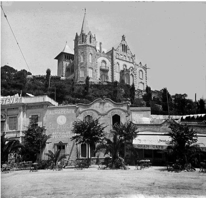 Casa Arnús a Barcelona. Josep Salvany i Blanch (1918)